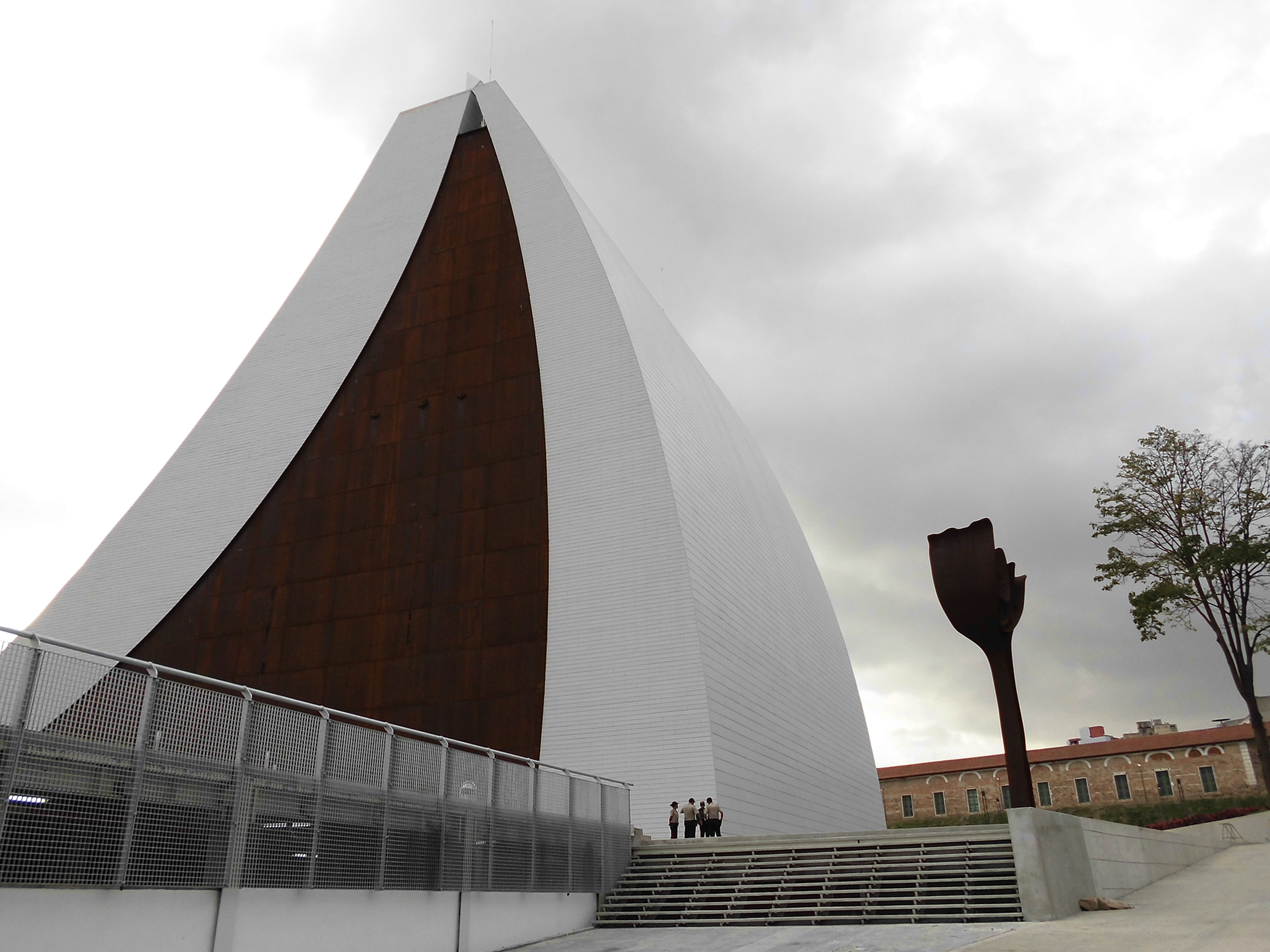 Mausoleo del libertador de américa - lateral derecho